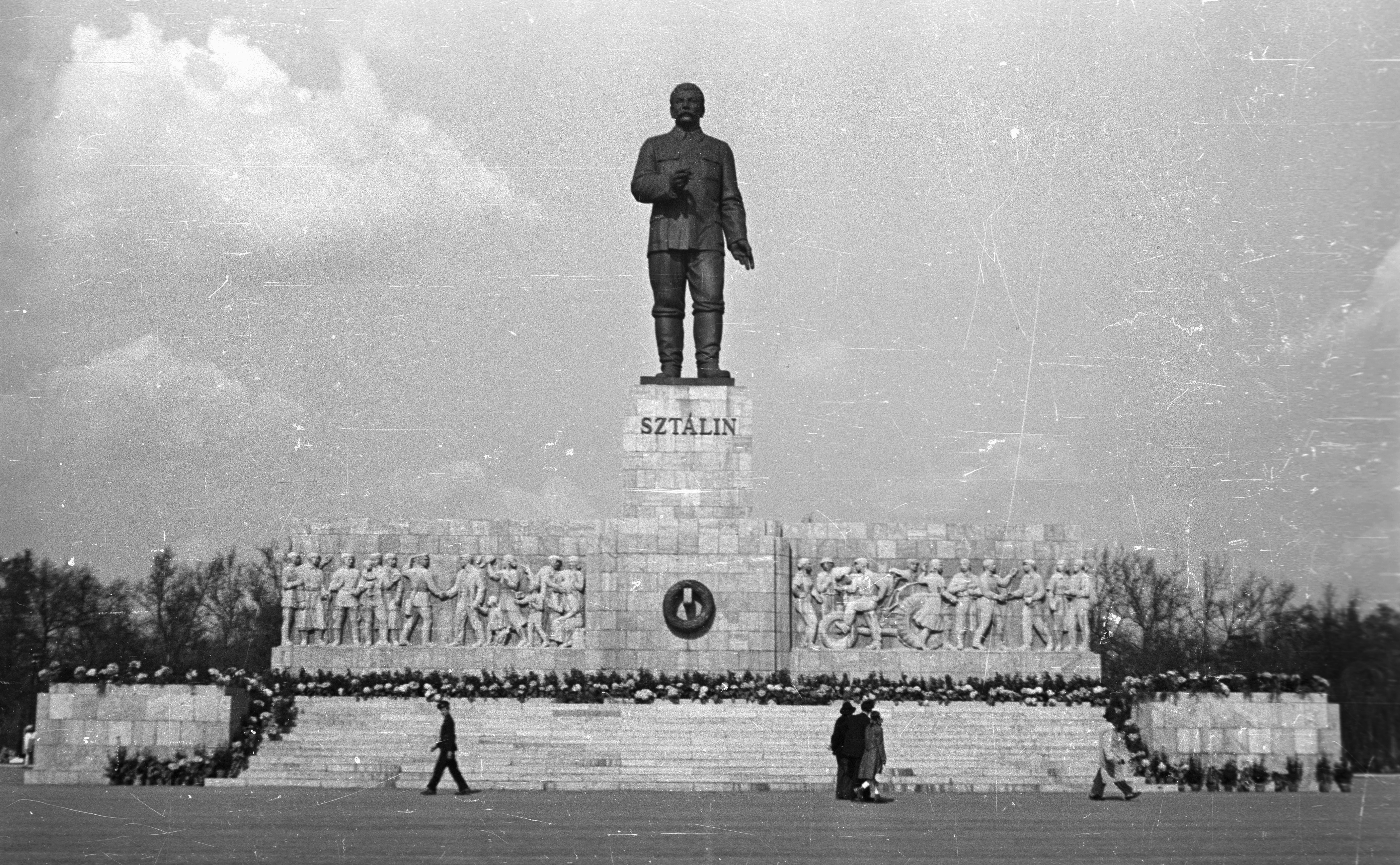 Sztálin szobor Budapesten. Fortepan. Adományozó Nagy Gyula